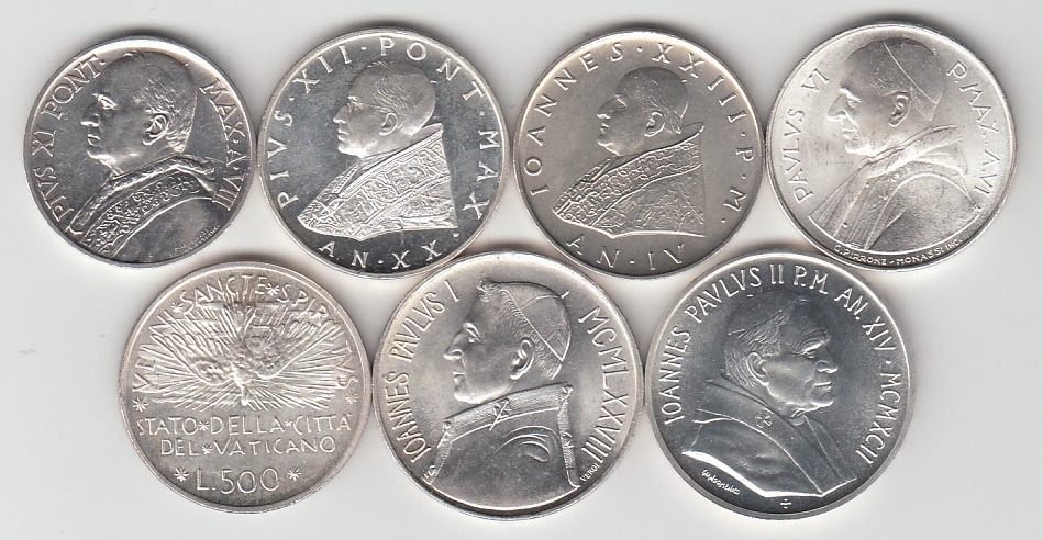 Lire-Silbermünzen Vatikan: Papst Pius XI., Pius XII., Johannes XXIII., Paul VI., Sedisvakanz, Johannes Paul I., Johannes Paul II.